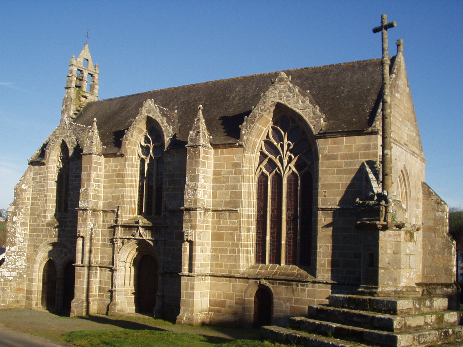 Chapelle Saint-Jacques Tréméven - 22